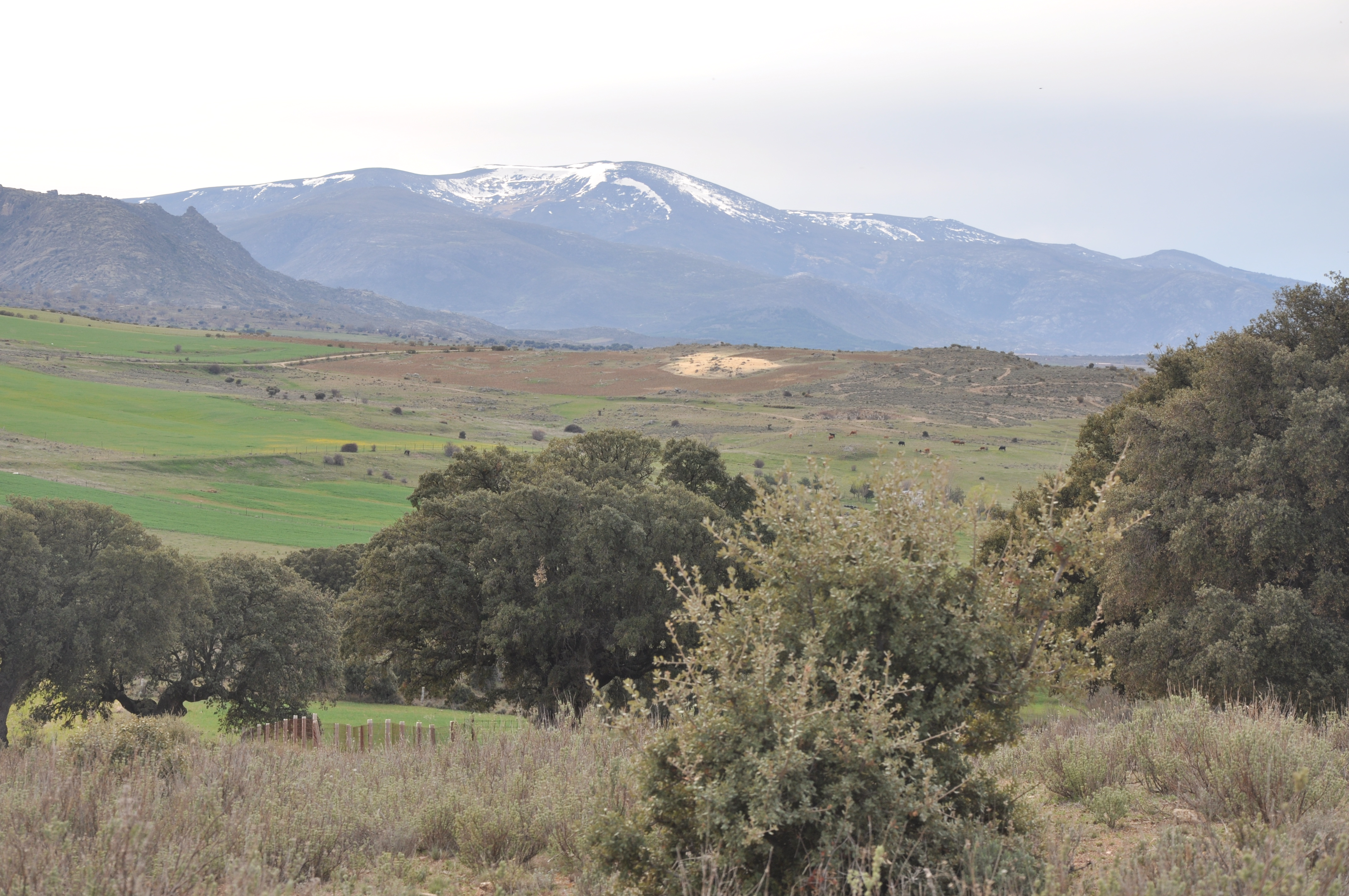 La Serrota vista desde la Sierra de Yemas en Mironcillo, Ávila, España. Encinas en primer plano. This is a photography of a Special Area of Conservation in Spain with the ID: ES4110034. Natura2000 entry, EEA entry